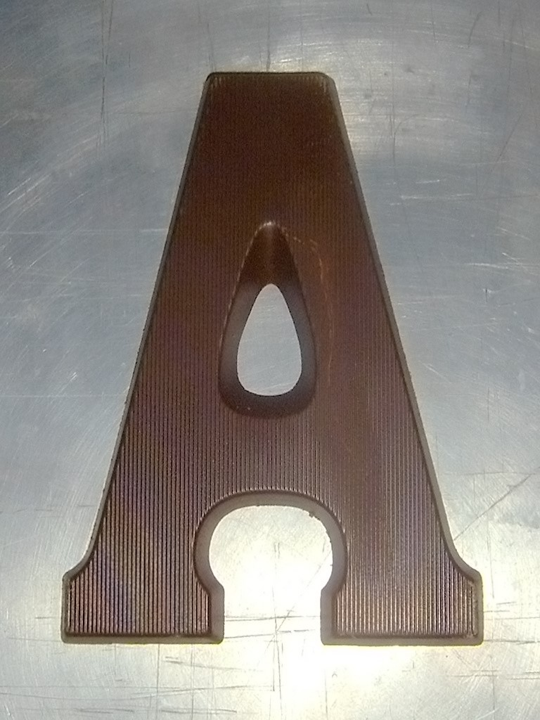 Chocoladeletter A